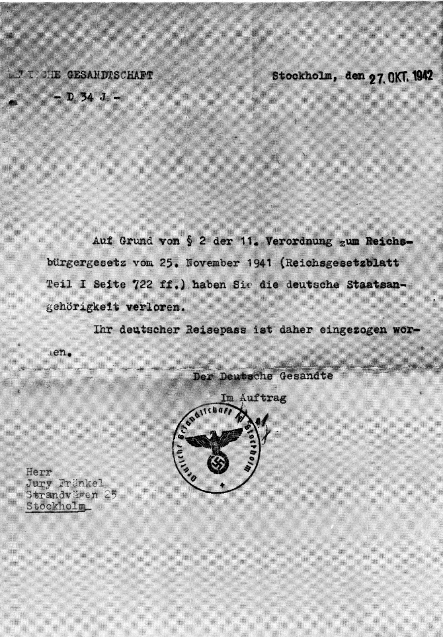 Ausbürgerungs-Mitteilung an den Pelzhändler Jury Fränkel, wohnhaft in Stockholm, vom 27. Oktober 1942, ausgestellt durch die Deutsche Gesandtschaft Stockholm.